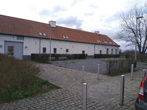 Foto NO-gevel na restauratie anno 2020